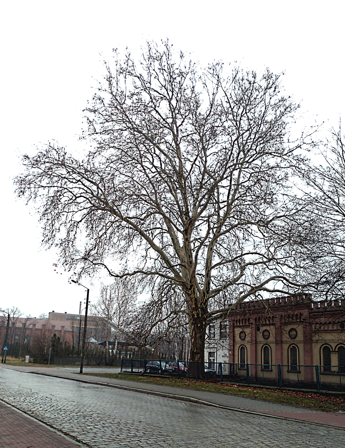 Pomnik przyrody platan klonolistny „Samuel” w Prudniku